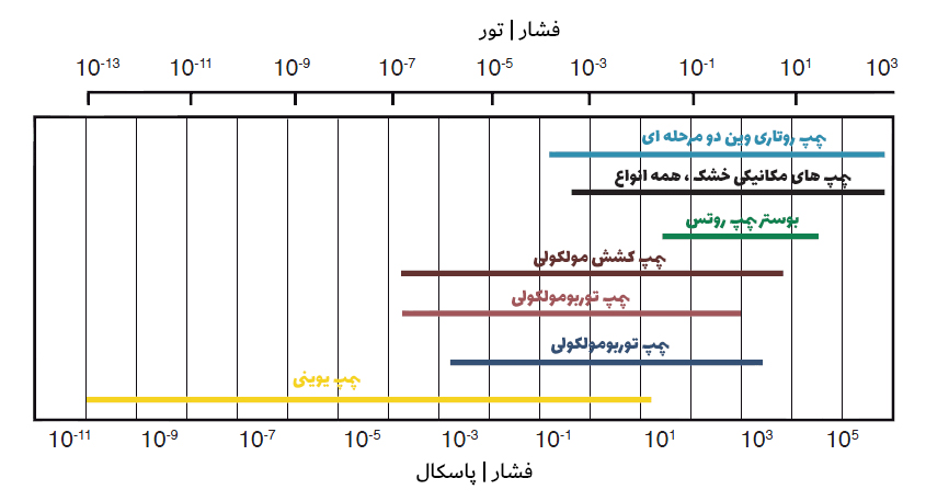 پمپ خلا